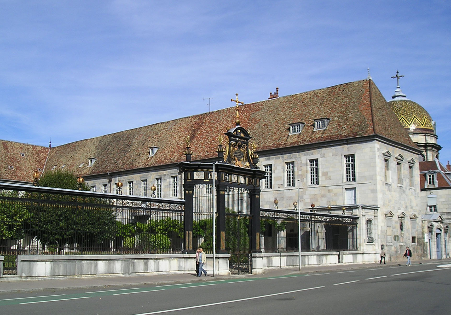 Hôpital Saint-Jacques de Besançon et sa grille